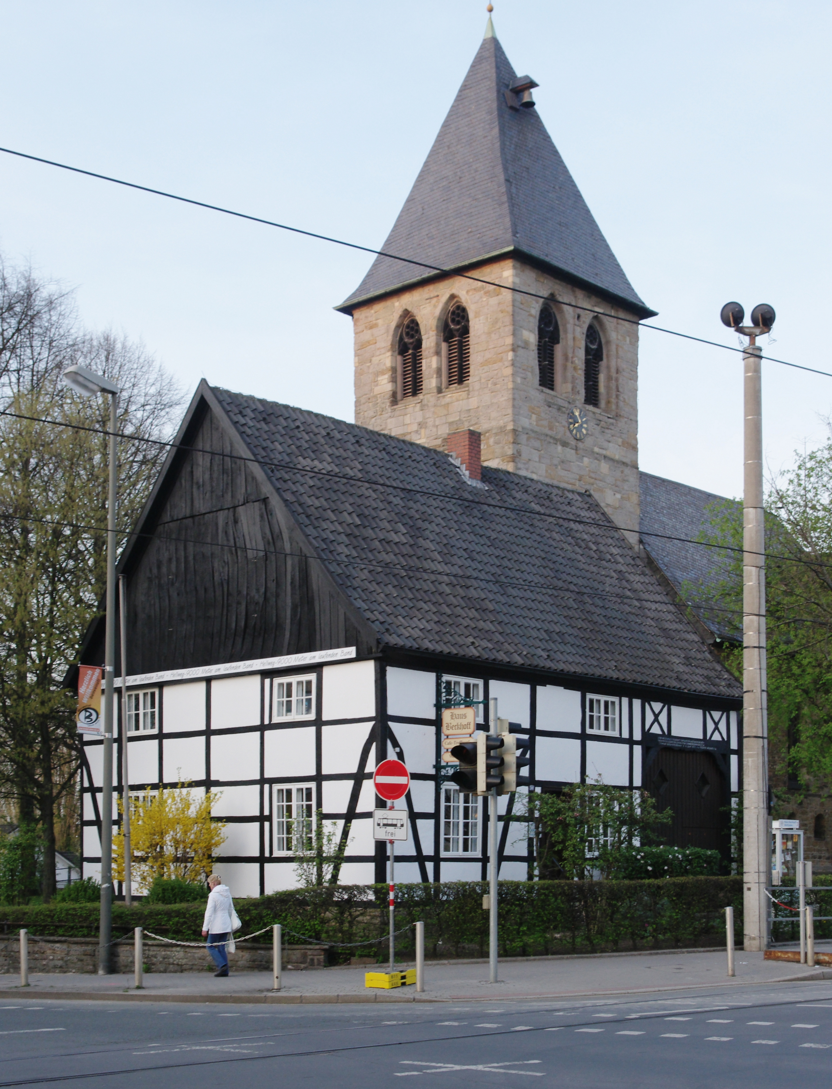 Denkmalgeschütztes Gebäude in Dortmund-Brackel, ehem. Kotten Beckhoff (Listennummer A 0413) und im Hintergrund die evangelische Pfarrkirche (Listennummer A 0035). This is a photograph of an architectural monument. 0413 This is a photograph of an architectural monument. 0035